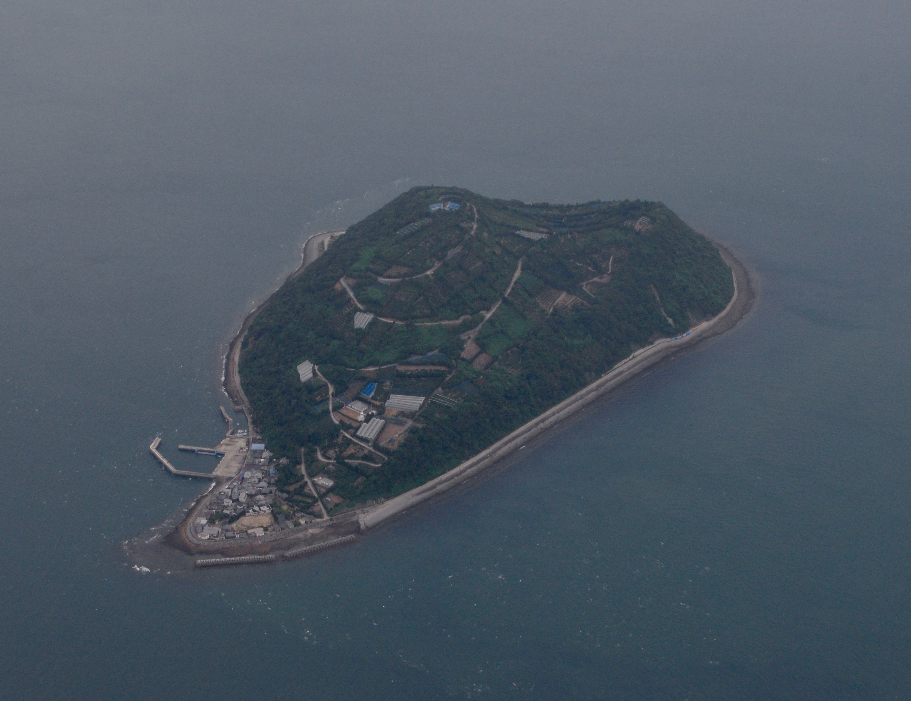 愛媛県松山市釣島